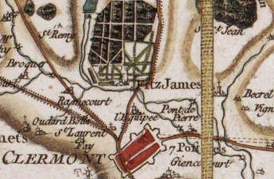 Fitz-James, carte de cassini